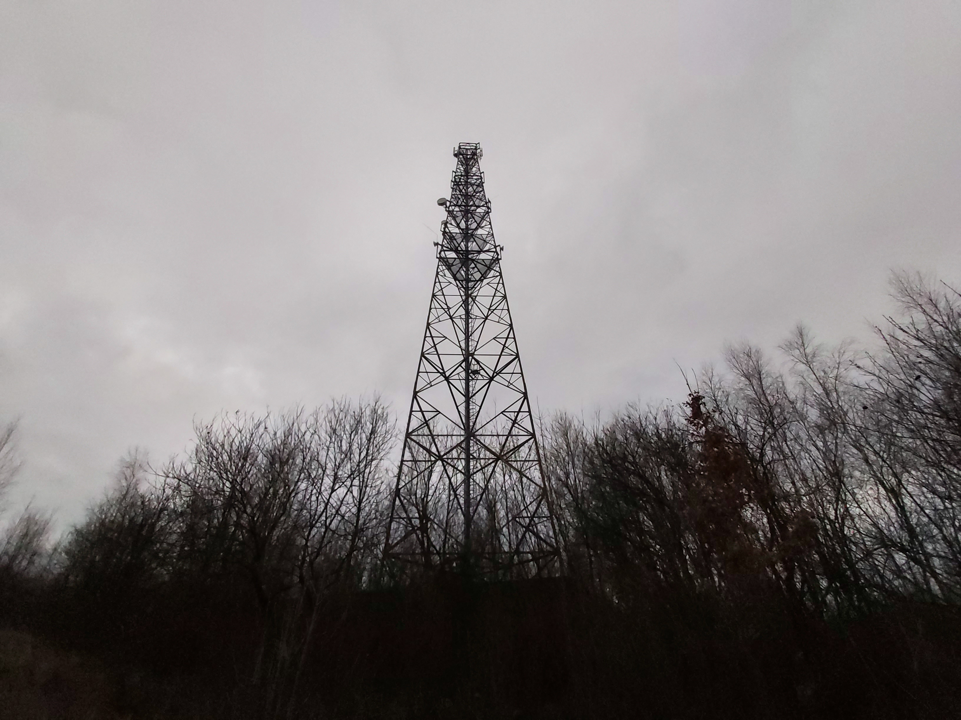 Stacja bazowa we wsi Zaskale w powiecie skarżyskim